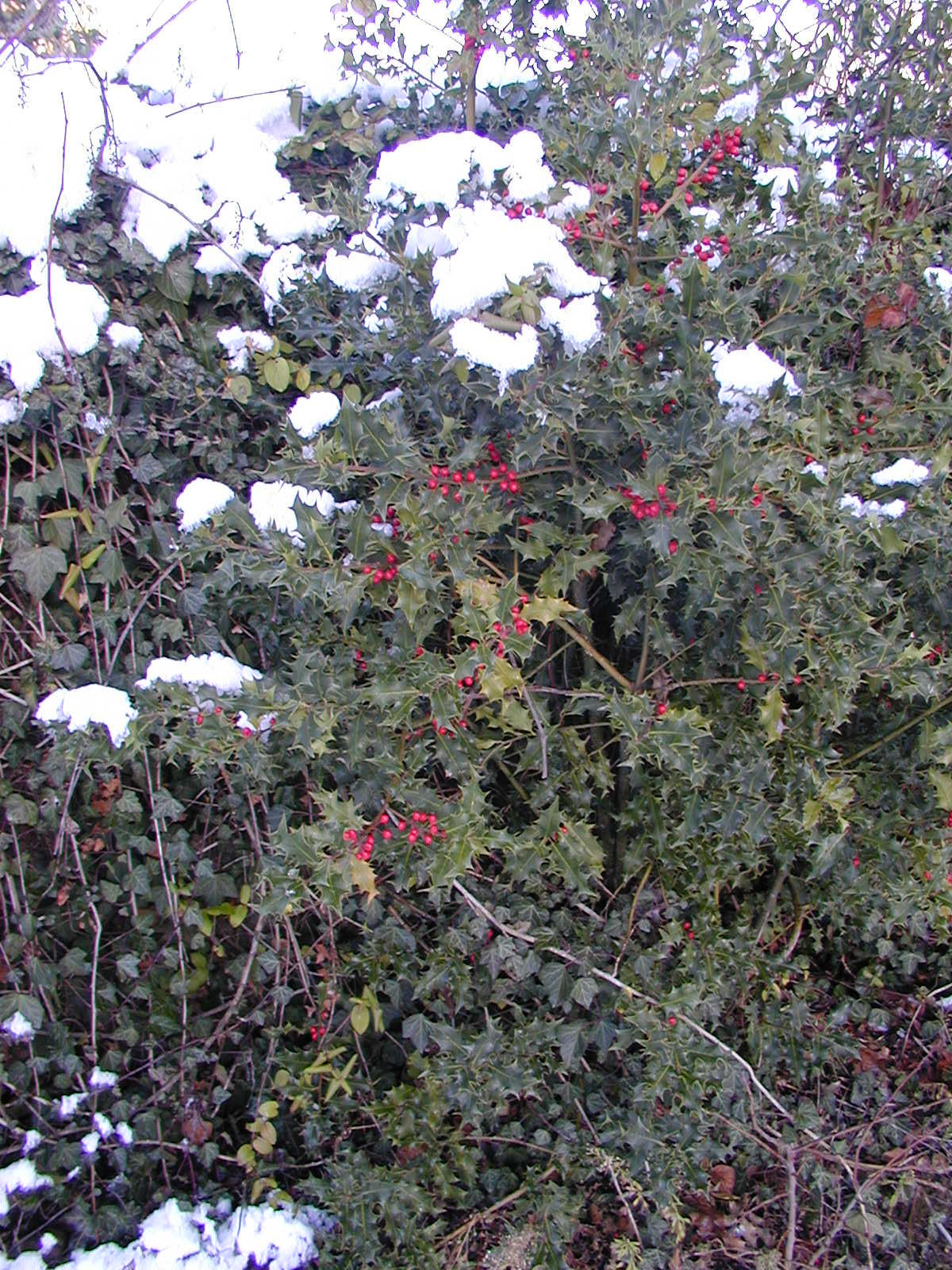 Branche de Ilex aquifolium houx sous la neige.